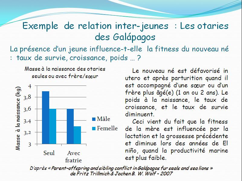 Exemple de relations inter-jeune: les otaries des Galapagos